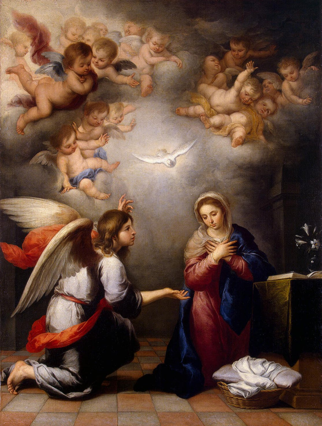 detail